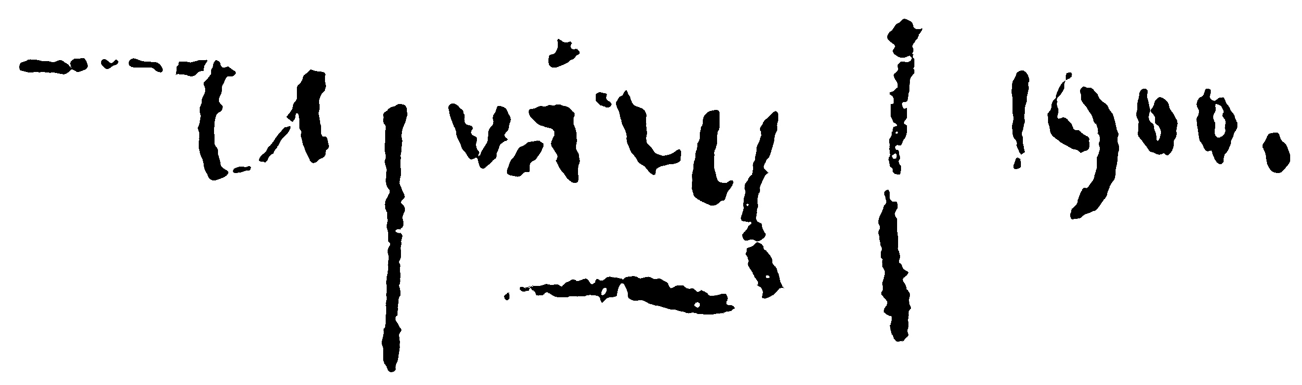 Ujváry Ignác festőművész aláírása.